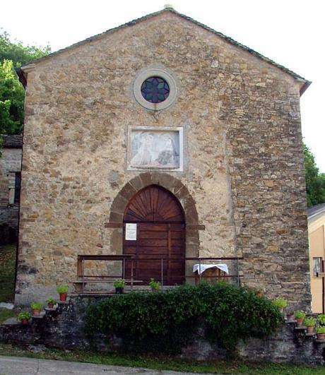 Chiesa della SS. Annunziata di Costageminiana